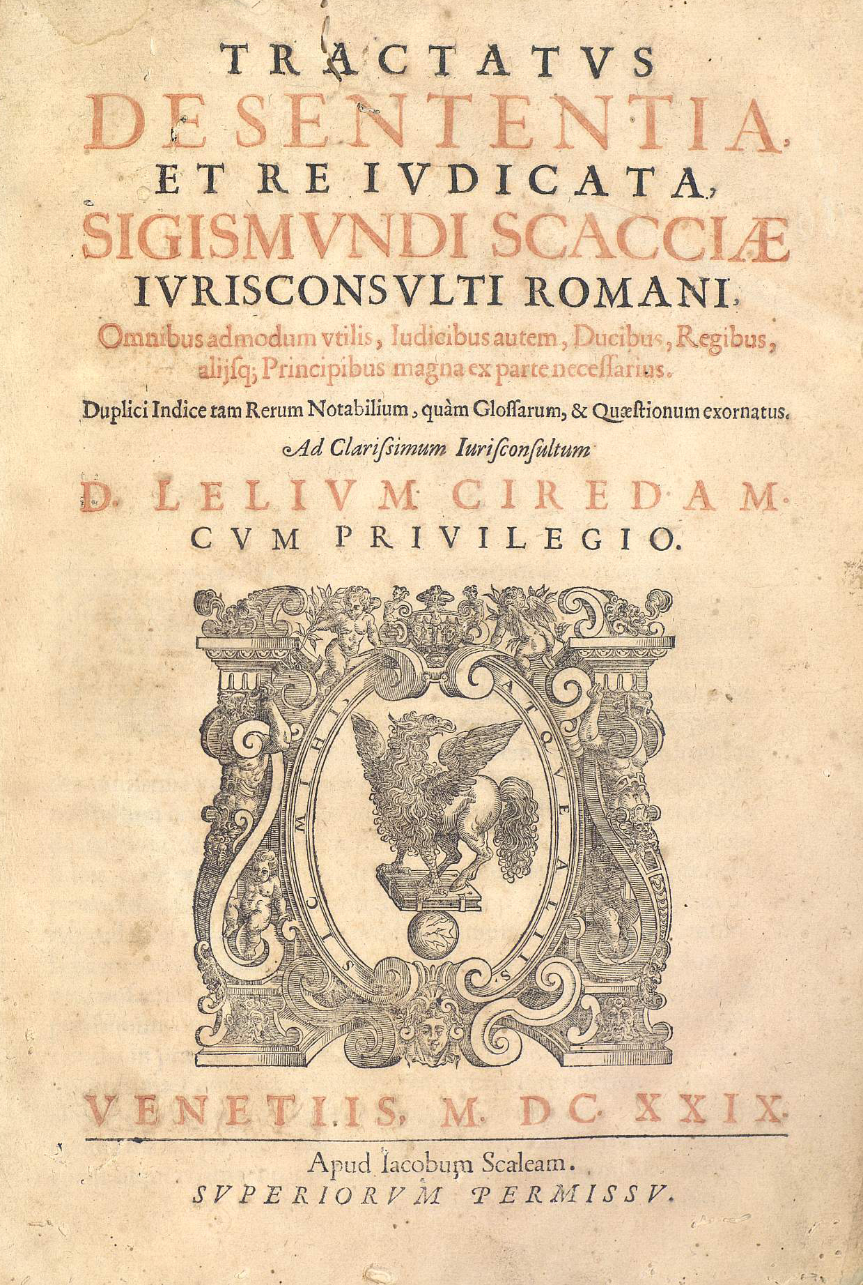 Frontespizio